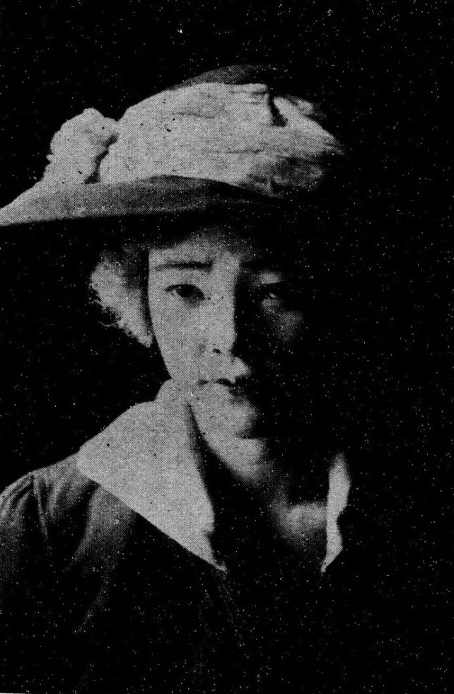 岡村文子 1919